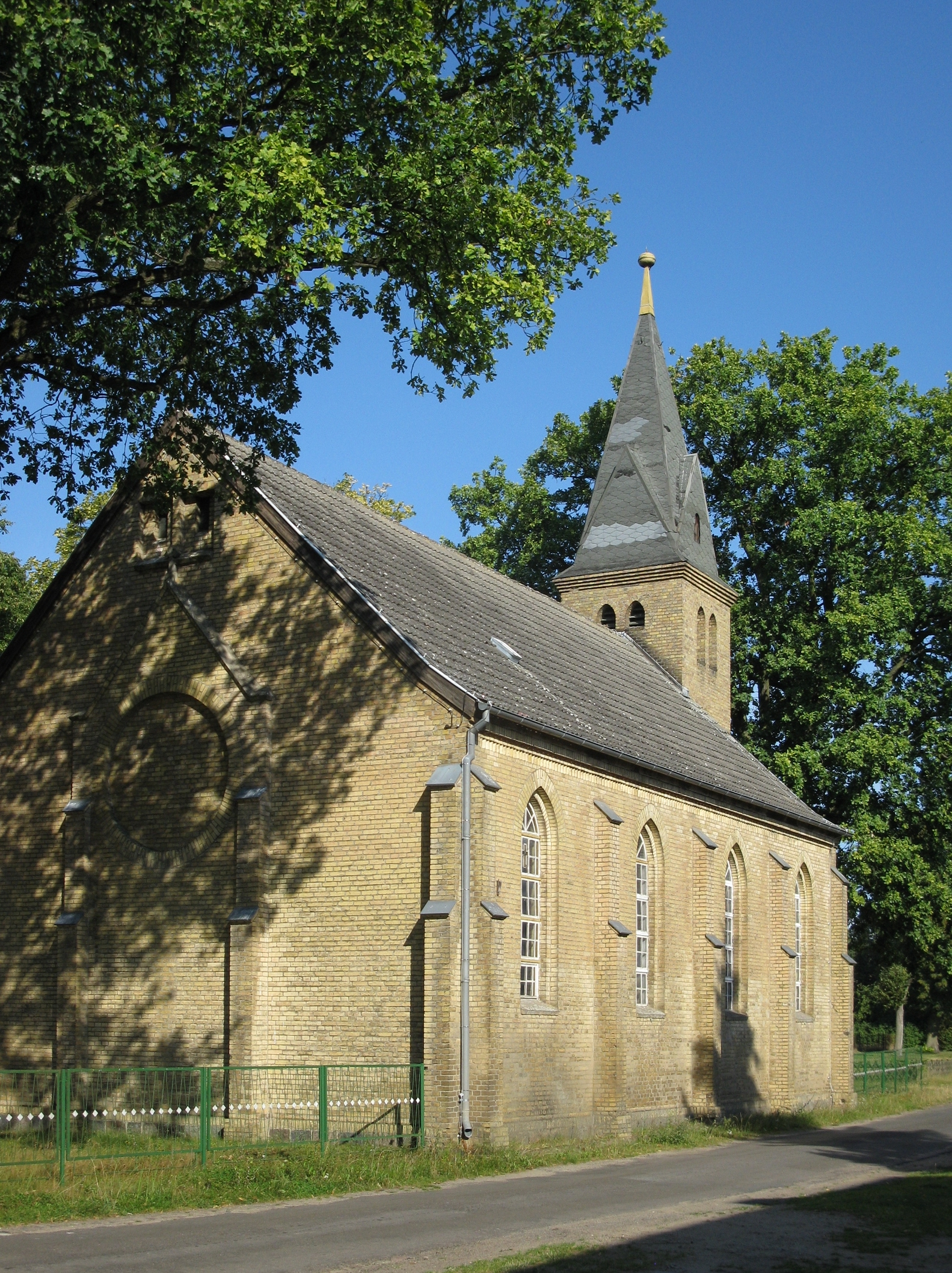 Südostansicht der Kirche in Klandorf, Gemeinde Schorfheide, Landkreis Barnim, Land Brandenburg, Deutschland